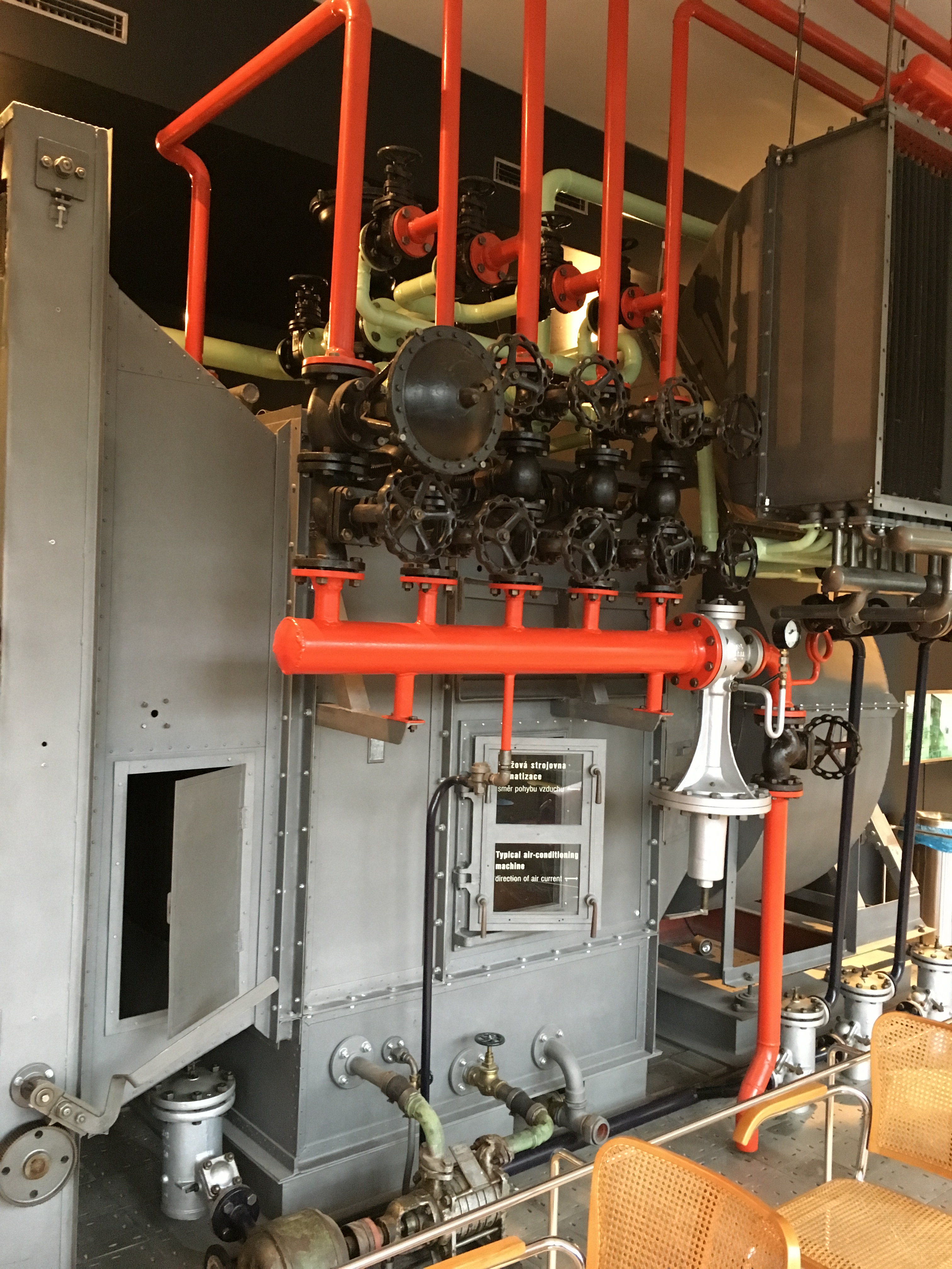 Baťa's Skyscraper, a.k.a. Building No. 21 in Zlín, Czech Republic